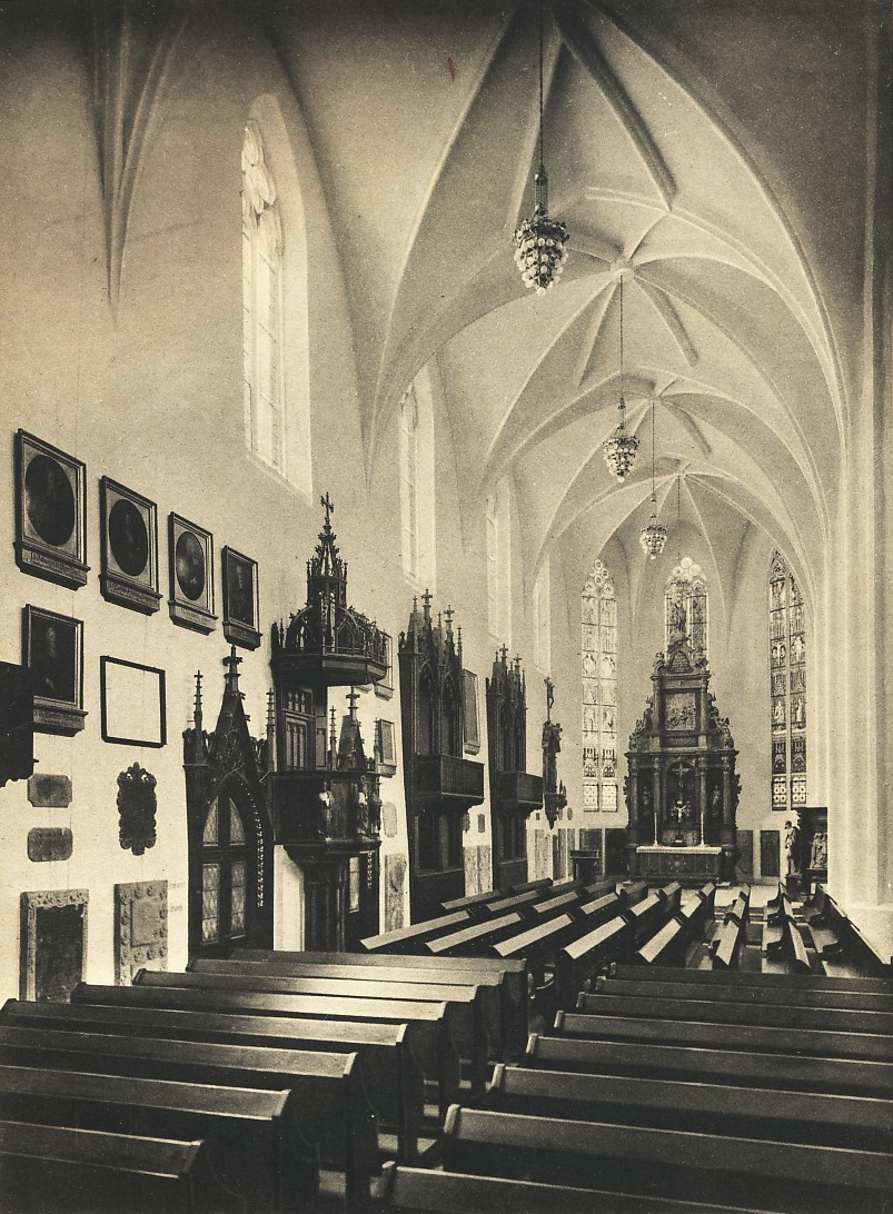 Blick von der Orgel zum Nosseni-Altar der Dresdner Sophienkirche 1910 nach der Renovierung